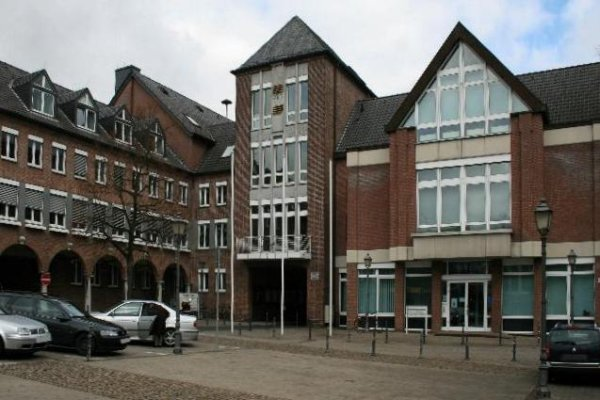 Rathaus Altbau (links), Markt 9, Denkmal Nr. 67 in Geilenkirchen